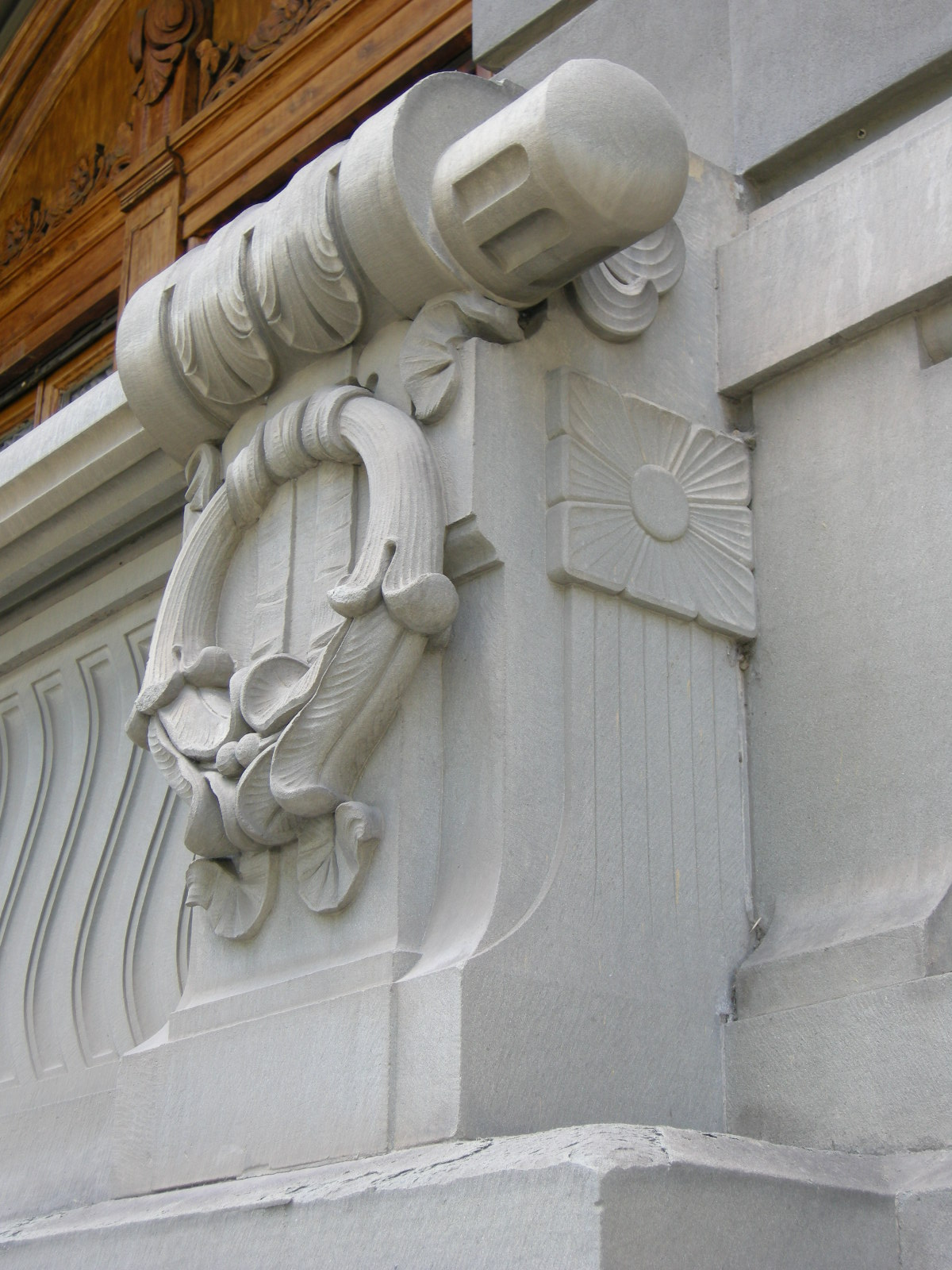 Villa uzielli, dettaglio 03 ghirlande